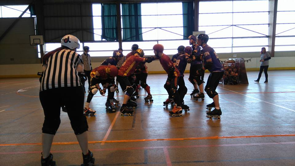 Début du match entre Nantes et Rouen lors des qualifications poule nord pour la Coupe de France masculine de roller derby de 2016